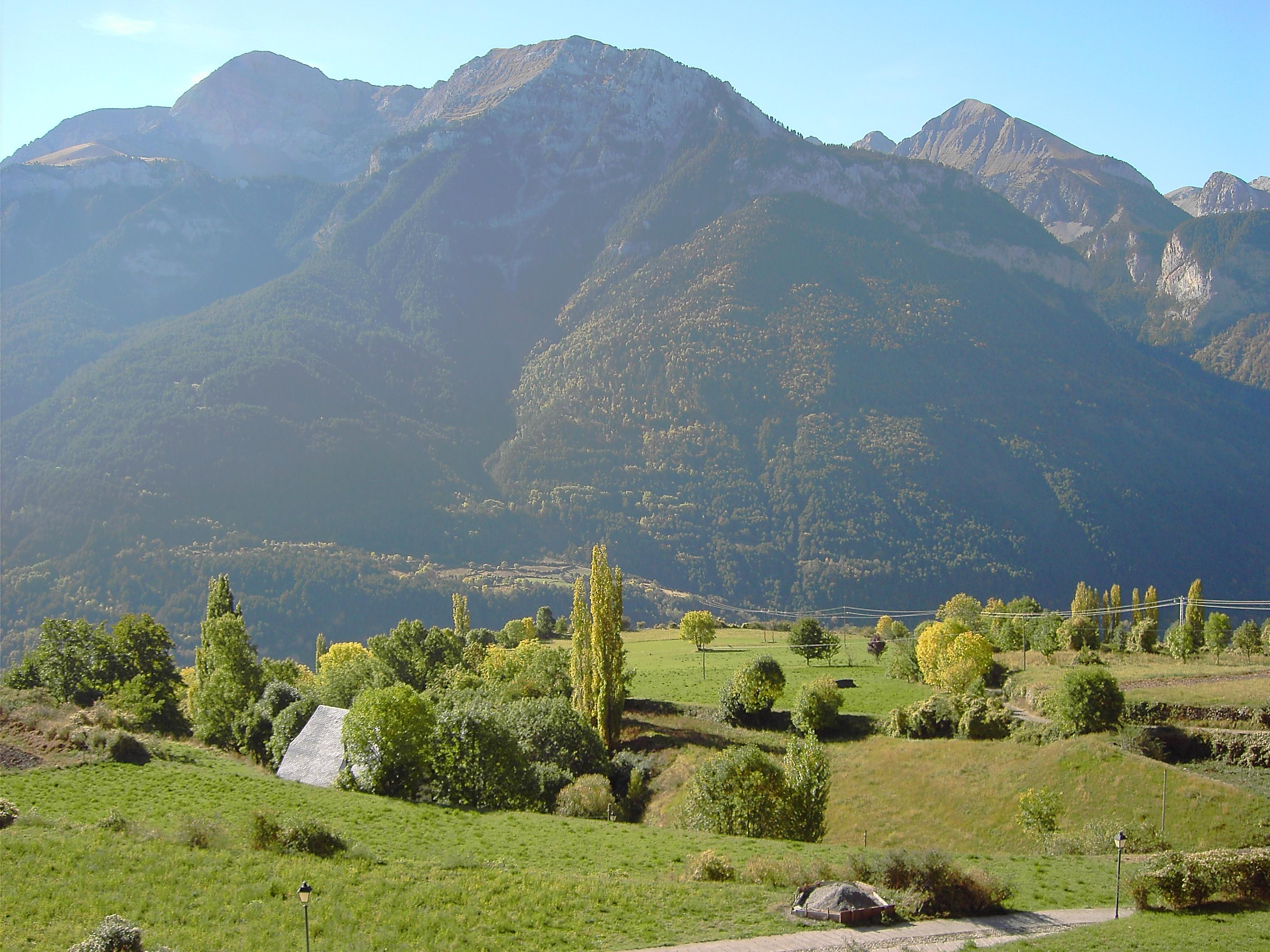 Prados de Chistén, en el valle de Chistau.